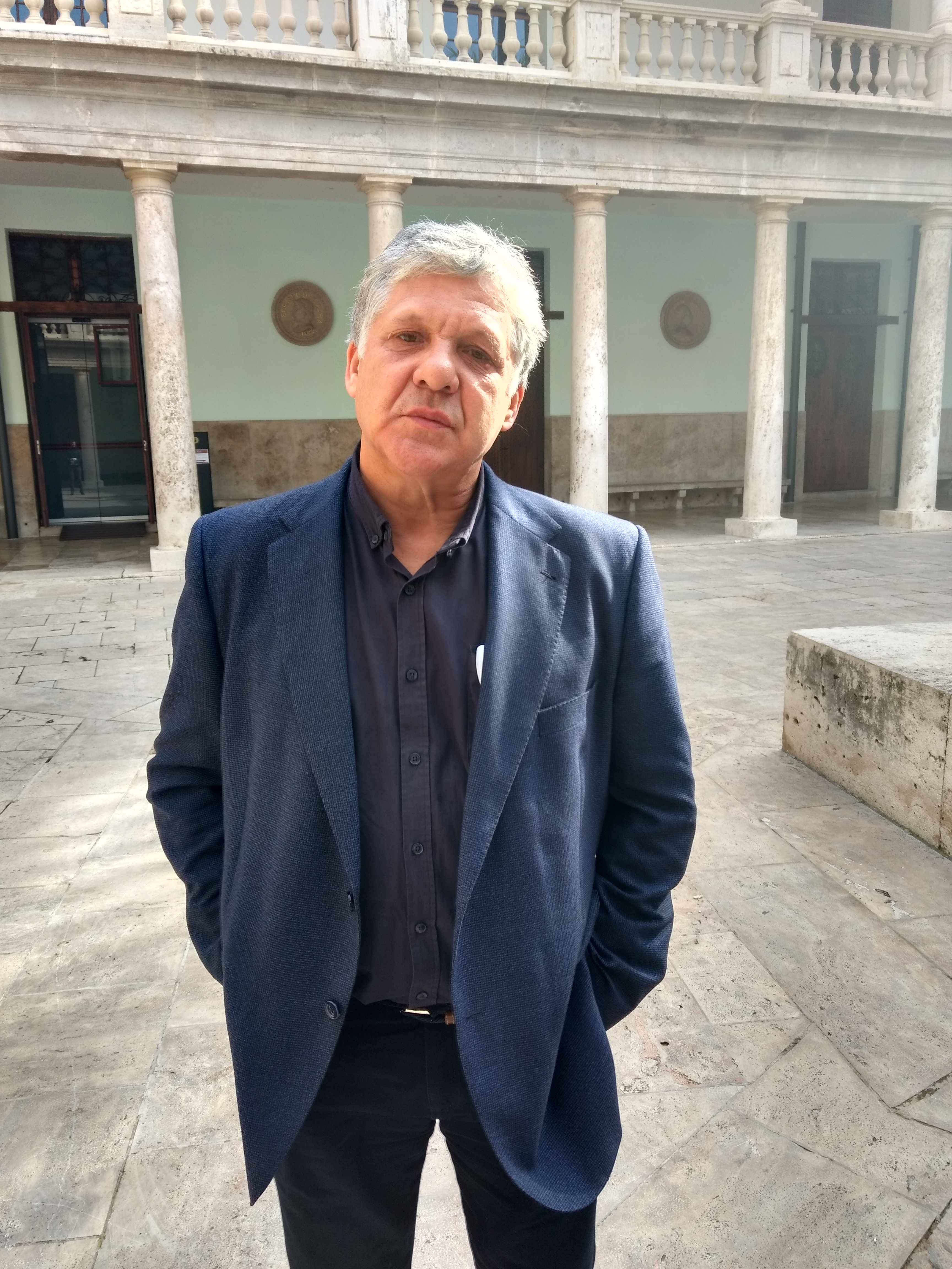 Paco Cabanes Pastor, Genovés I.